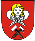 Znak obce Břidličná